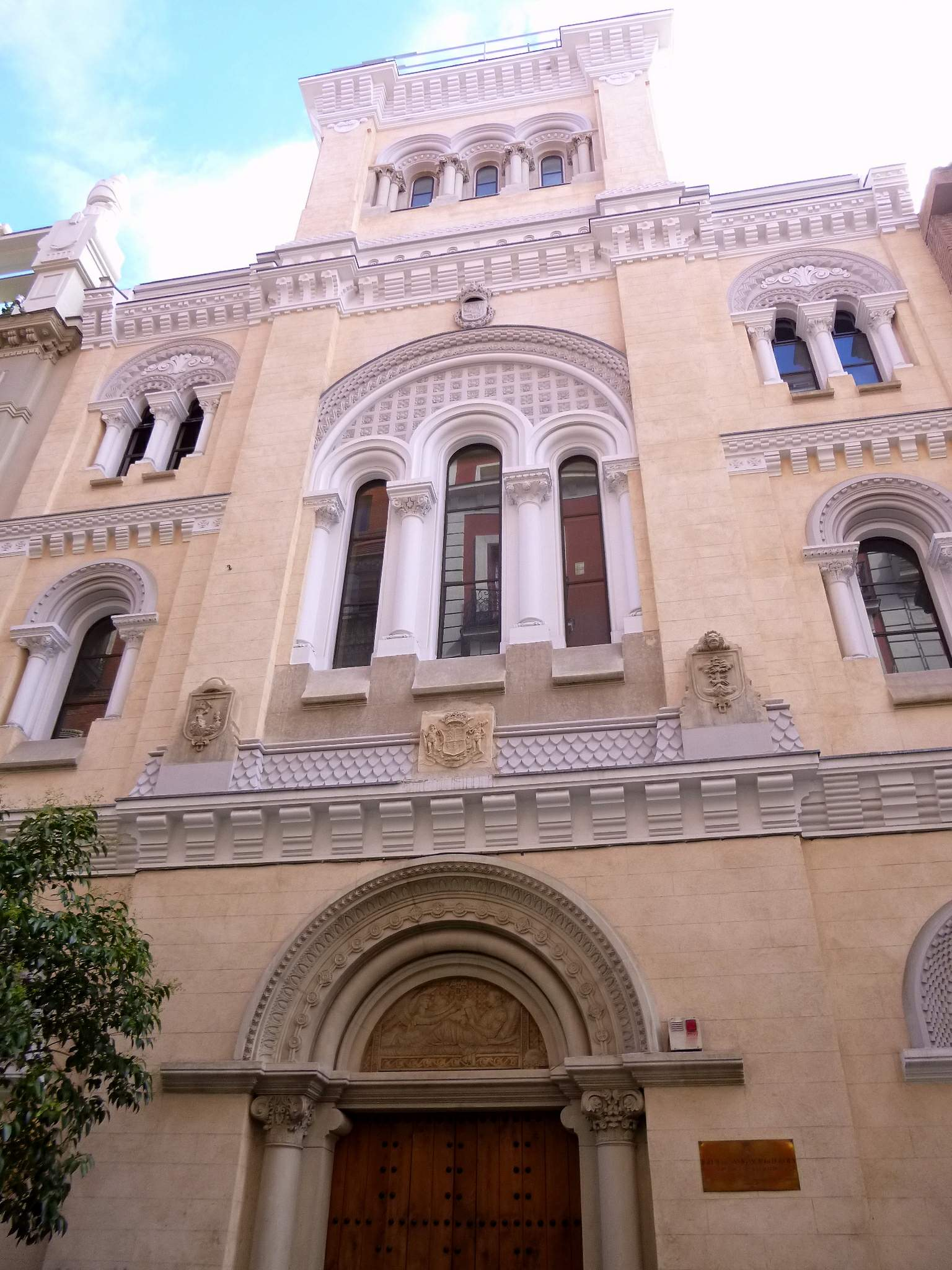 Iglesia de San Ignacio de Loyola (Madrid)